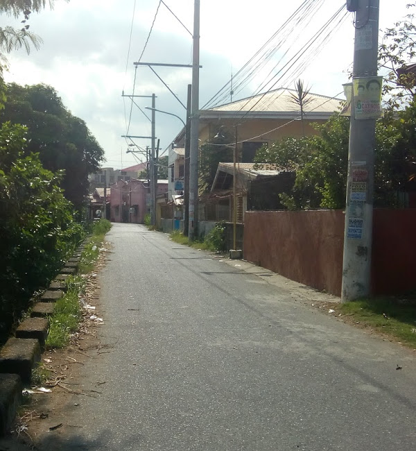 Daanang bumabaybay sa National Irrigation Authority, Parian